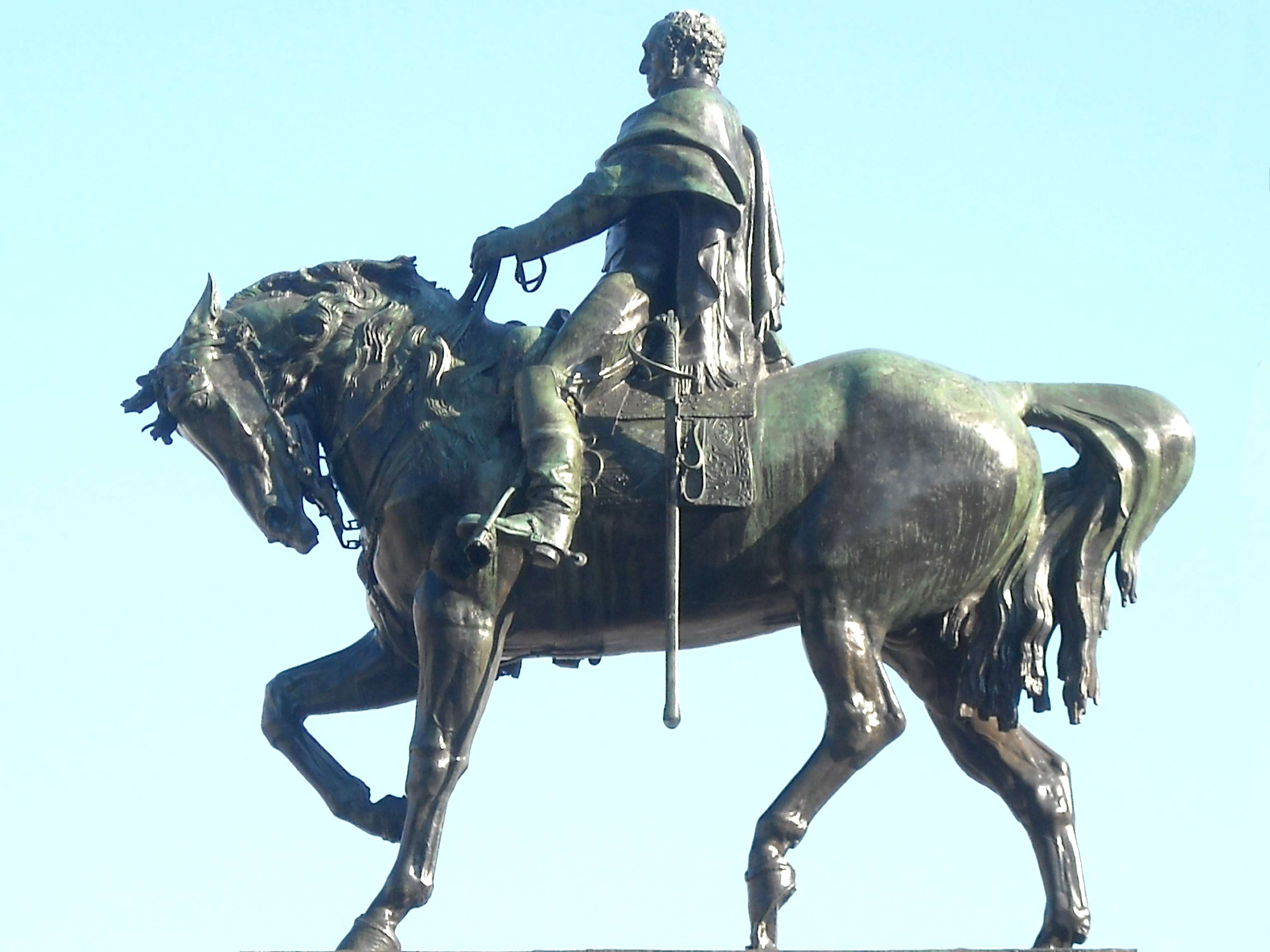 General José Artigas (estatua ecuestre de Plaza Independencia). Ubicada en el departamento de Montevideo